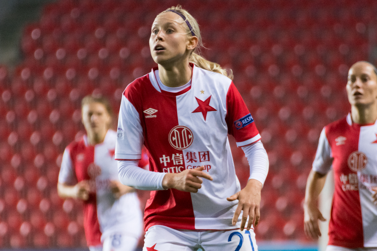 Kateřina Svitková vs FC Rosengard on 1 November 2018